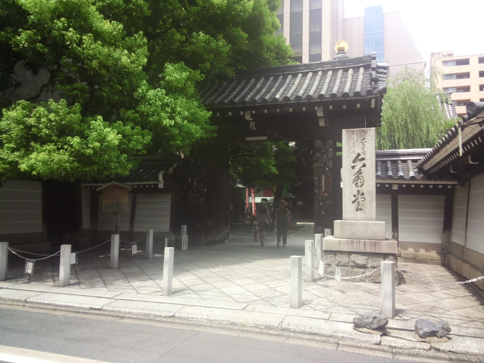 頂法寺 六角堂 - 入口